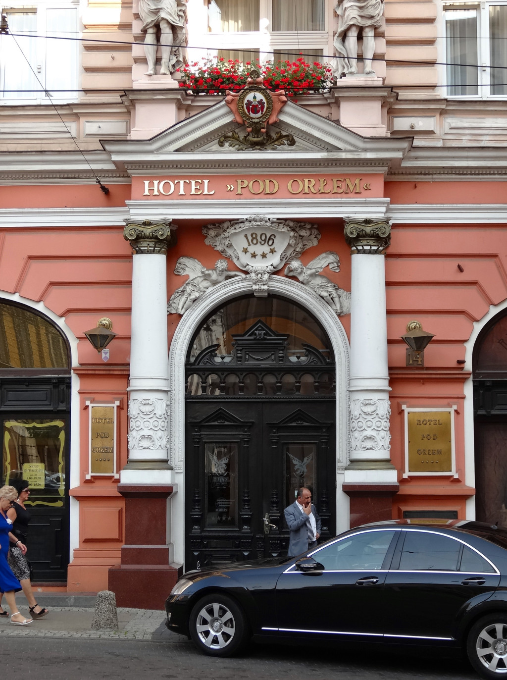 Hotel Pod Orłem w Bydgoszczy przy ul. Gdańskiej 14 (zbud. 1896, Józef Święcicki); na zdj. detale architektoniczne budynku